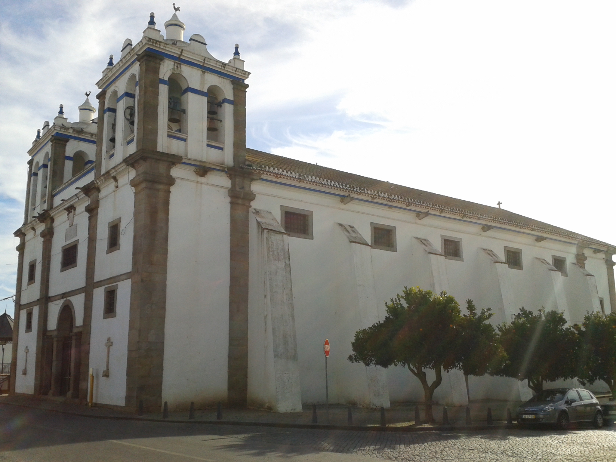 Igreja Matriz de Fronteira.